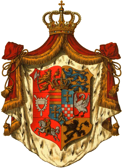 Wappen des Großherzogtums Oldenburg im 2. Deutschen Kaiserreich